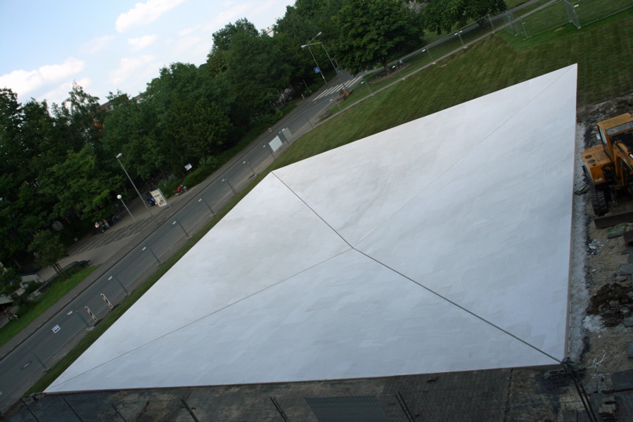 Foto der Baustelle der Square Depression in Münster, 10 Tage vor Eröffnung